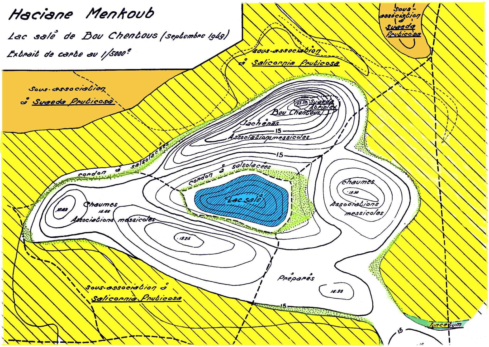 Représentation schématique de la zonation des groupements végétaux sur les bords du lac salé de Bou Chentous (Oranie, Algérie ; d'après Simoneau, 1952). Cette carte montre l'importance du microrelief pour la répartition de la végétation.